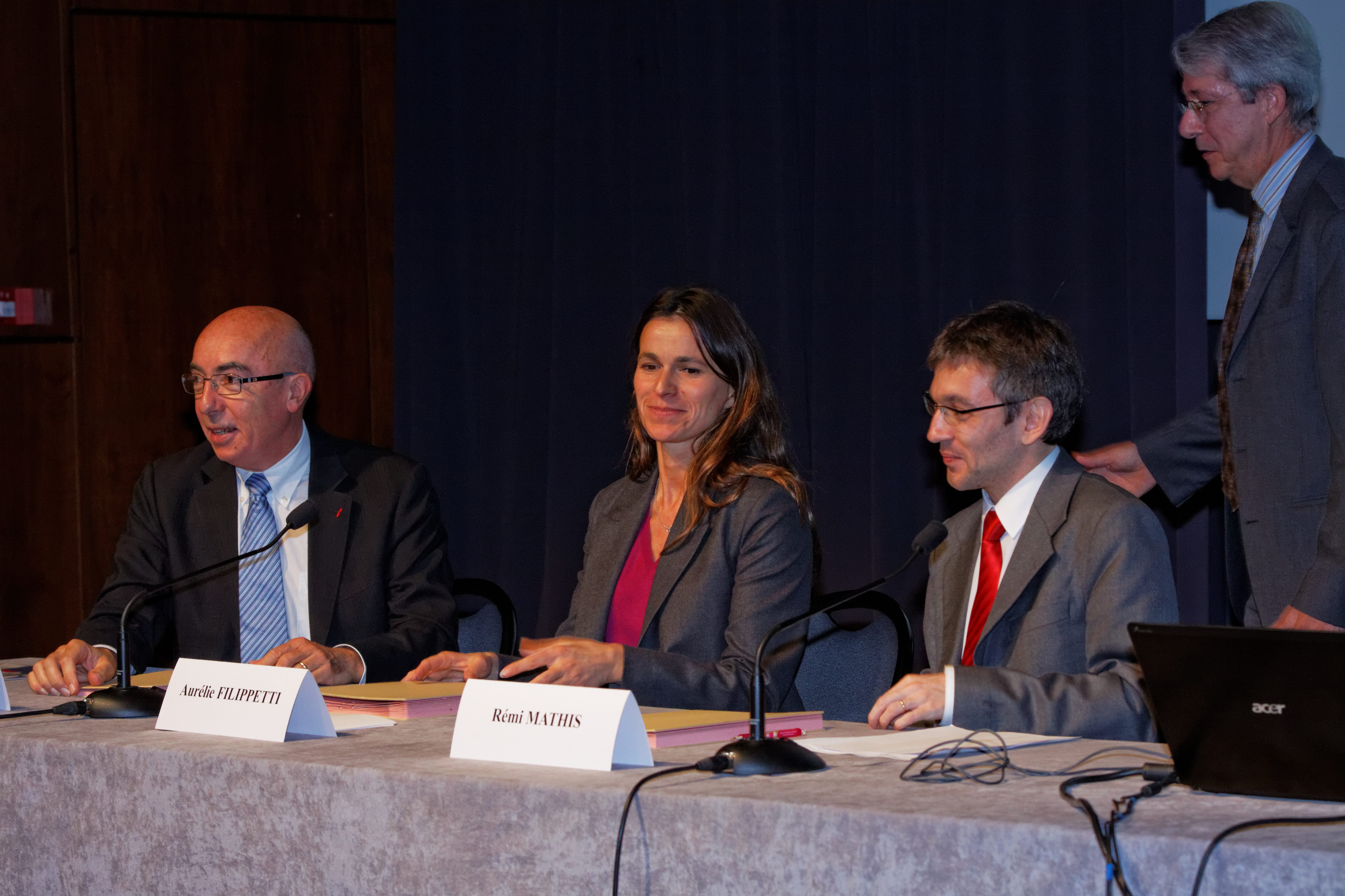 Aurélie Filippetti, Rémi Mathis et Michel Cosnard signant la convention lançant Semanticpedia.